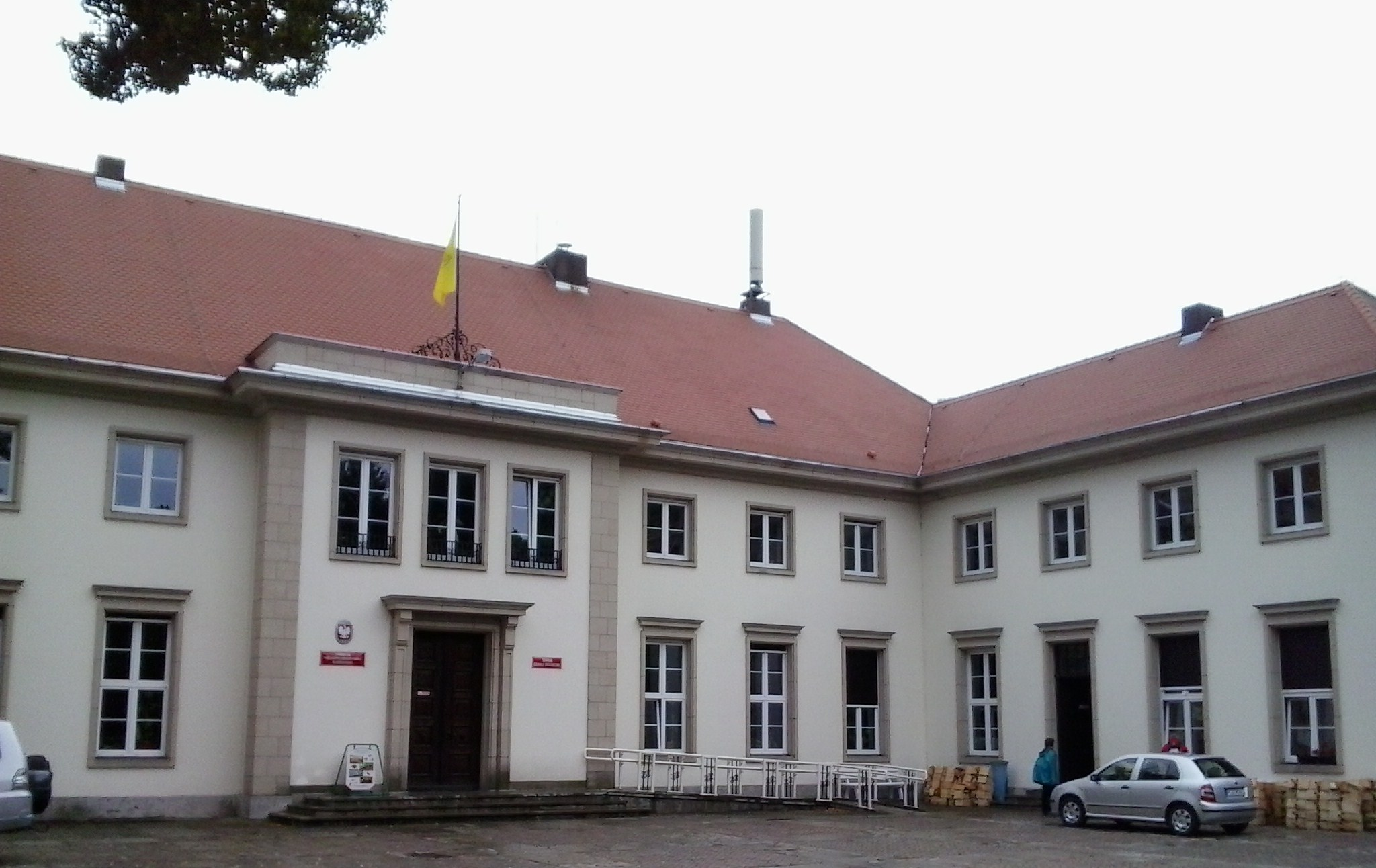 Dyrekcja i Muzeum Wielkopolskiego Parku Narodowego w Jeziorach.